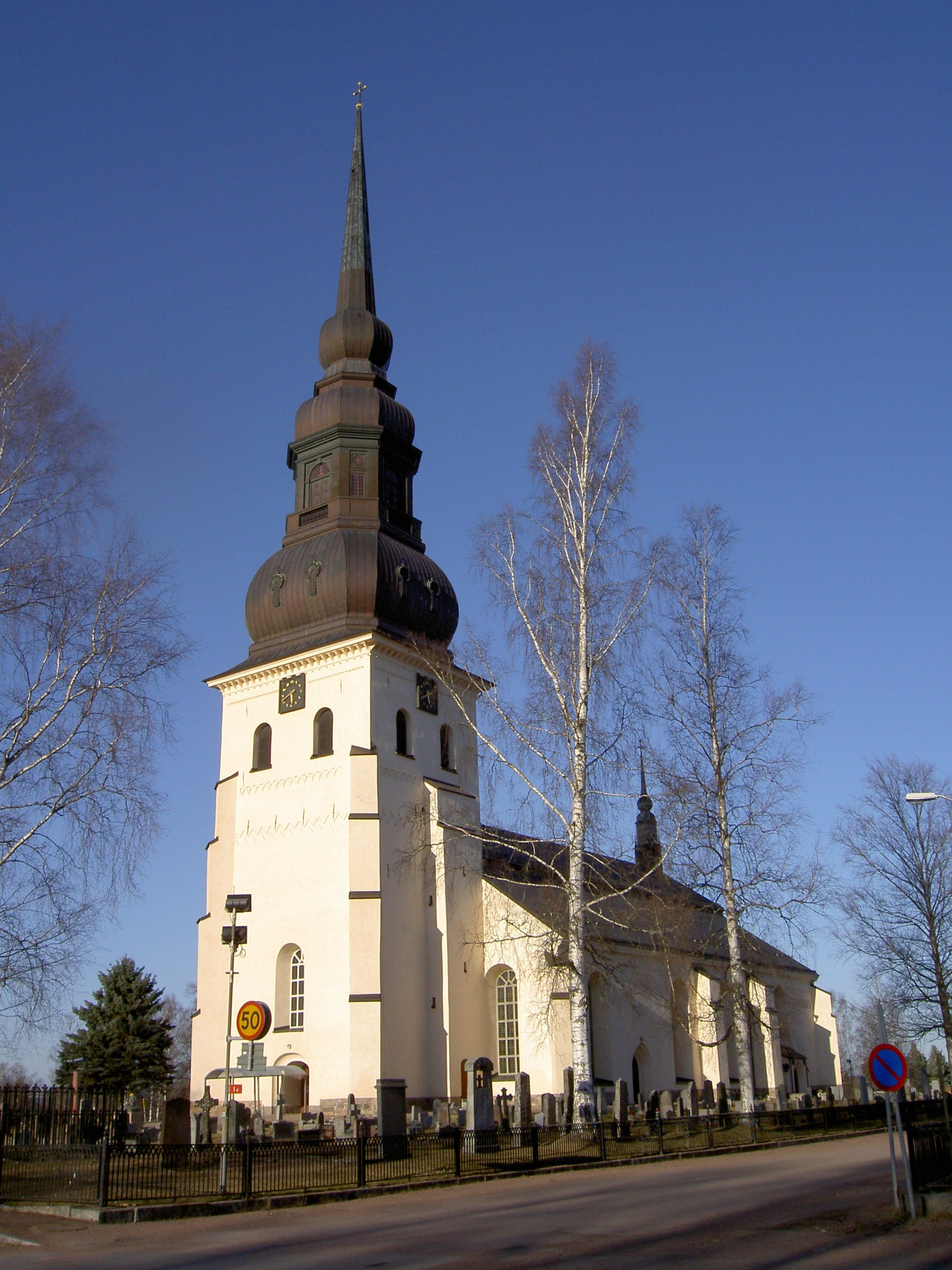 Stora Tuna kyrka, Borlänge, Sverige/Sweden